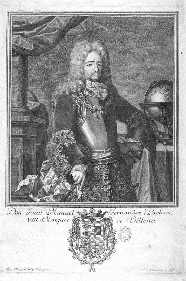 Retrato del aristócrata y erudito español Juan Manuel Fernández Pacheco (1650-1725), que fue marqués de Villena y duque de Escalona y el fundador y primer director de la Real Academia Española.